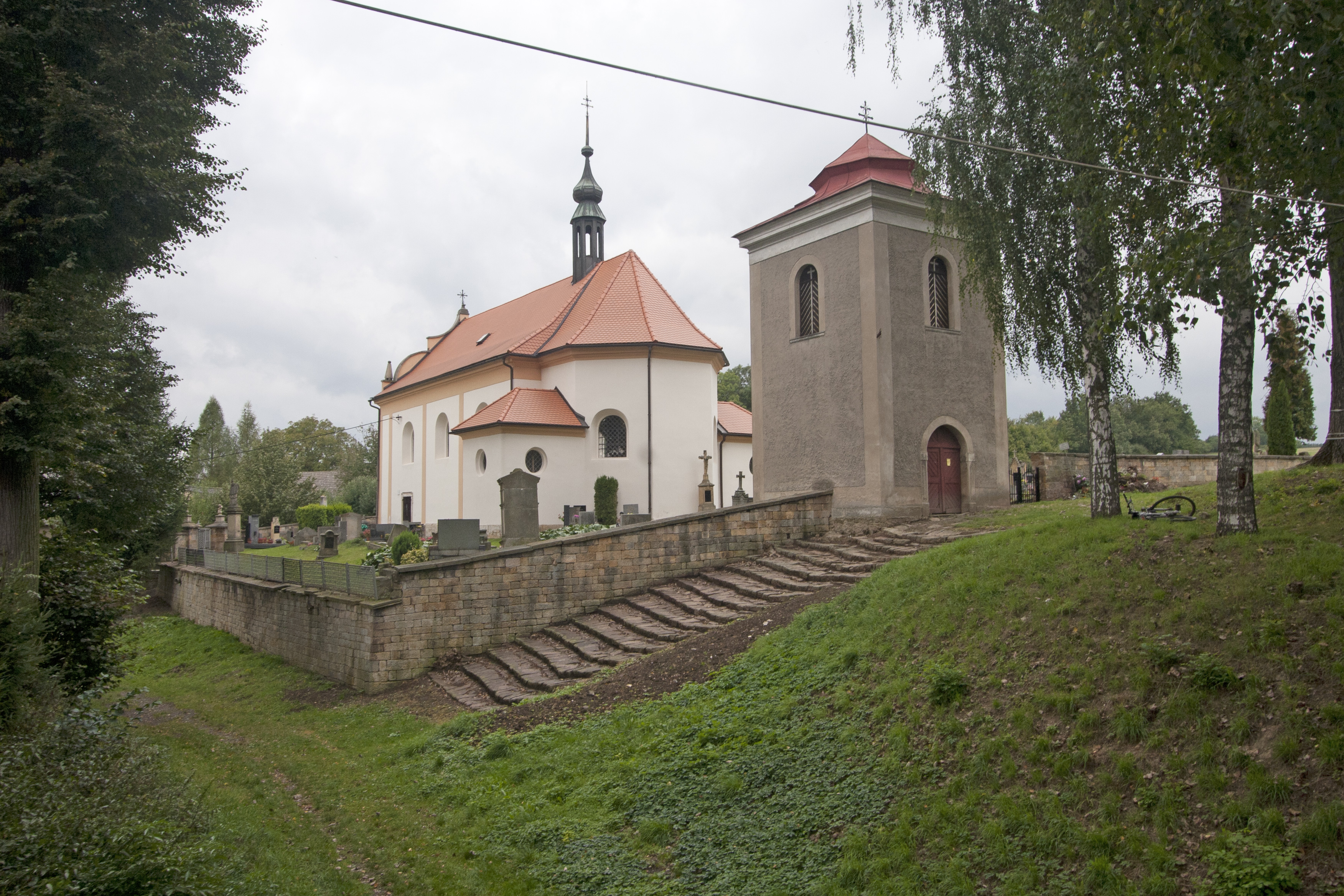 Kostel sv. Maří Magdalény (Jeřice), Jeřice